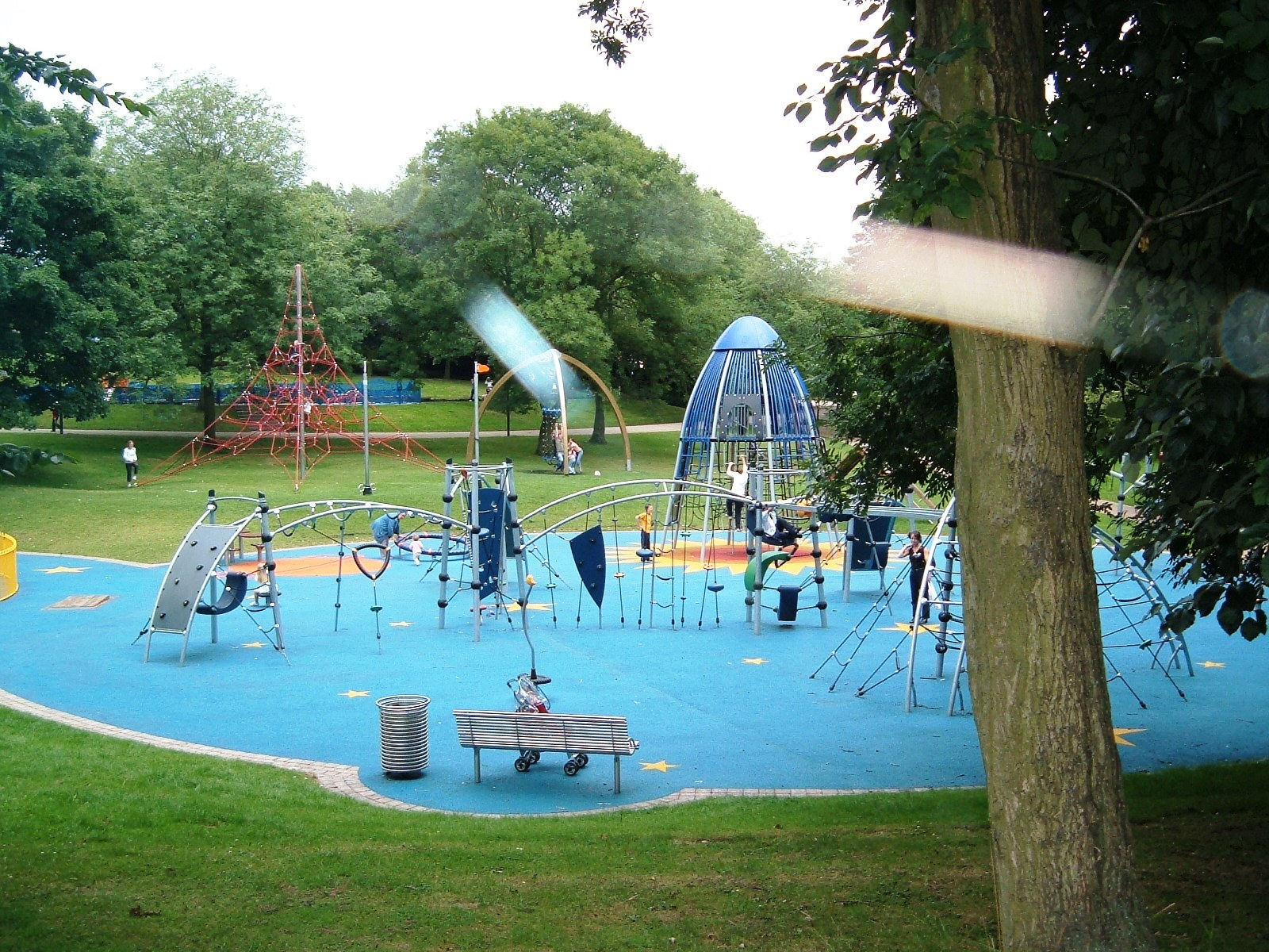 Hanley Park, en Stoke-on-Trent.